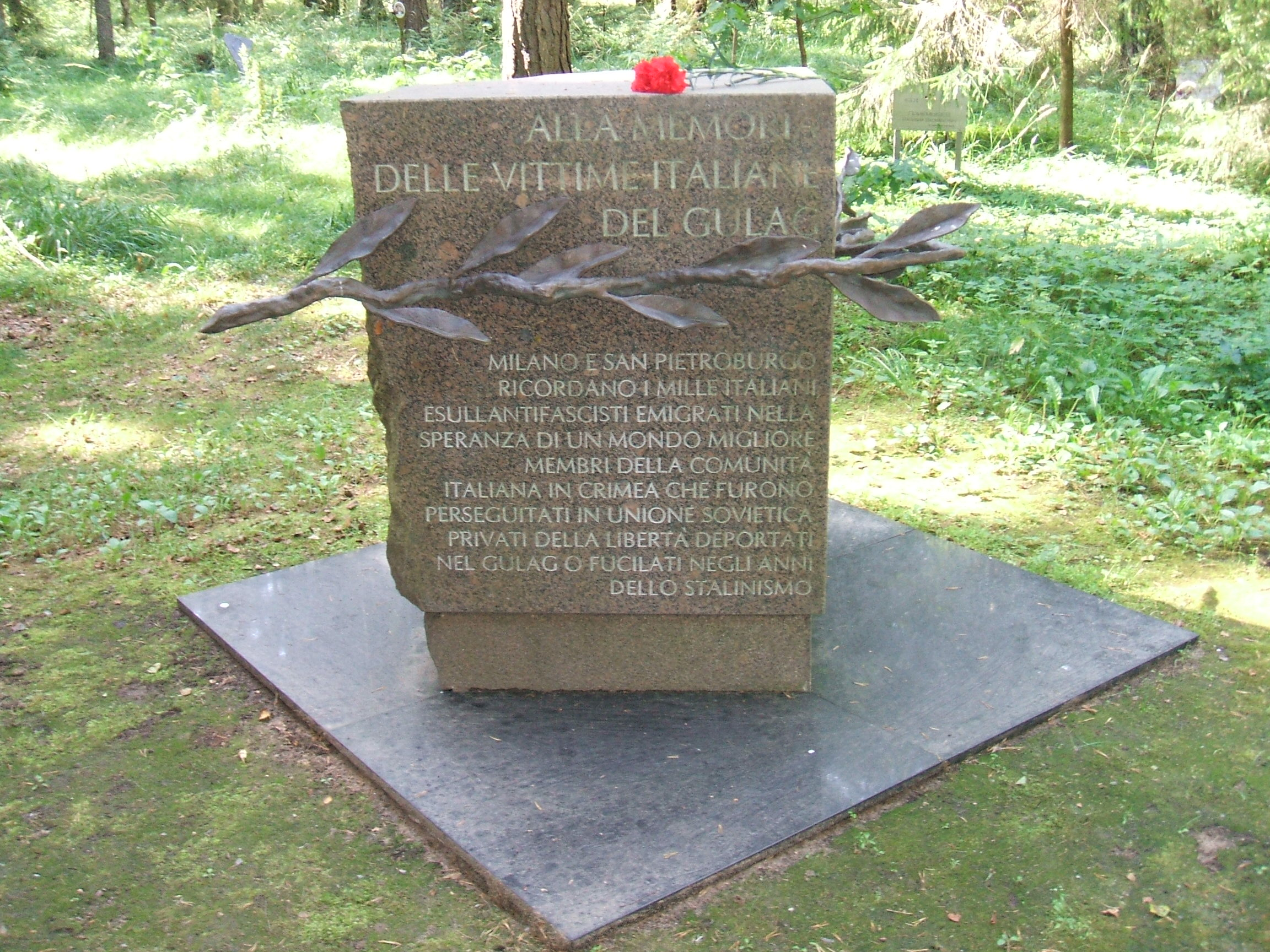 Памятники Левашовской пустоши